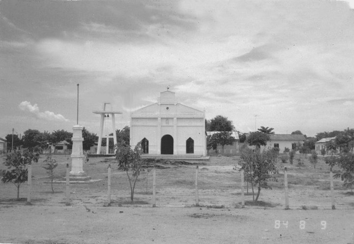 Iglesia en la plaza principal de El Paso,Cesar,Colombia